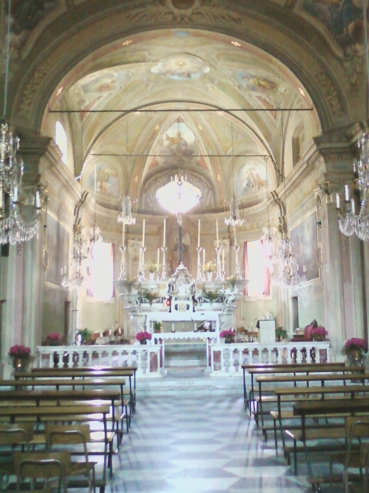 presbiterio chiesa di san Pietro d'Olba in Urbe (Italy)